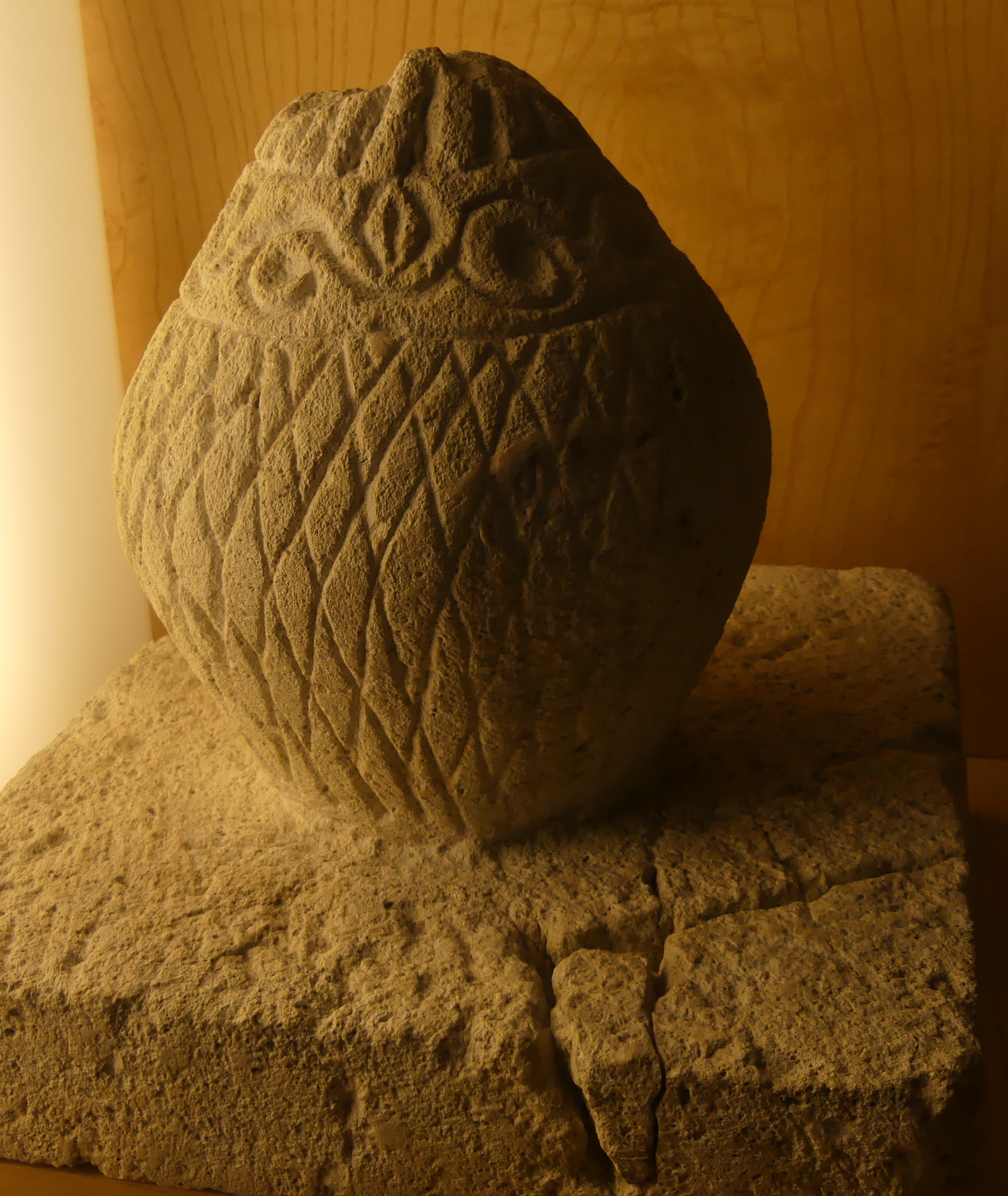 Base surmontée d'une pomme de pin, symbole d'immortalité, en pierre calcaire. Elle était placée sur un petit monticule recouvrant la tombe.